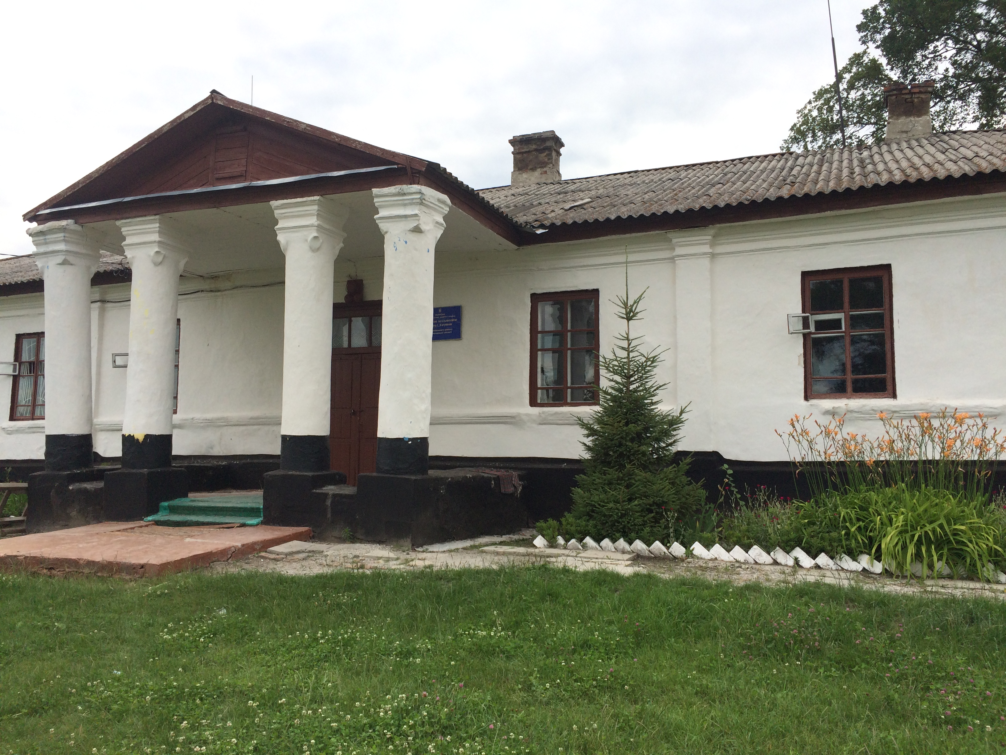 Панський маєток, у якому за часів СРСР і дотепер розташована місцева школа.